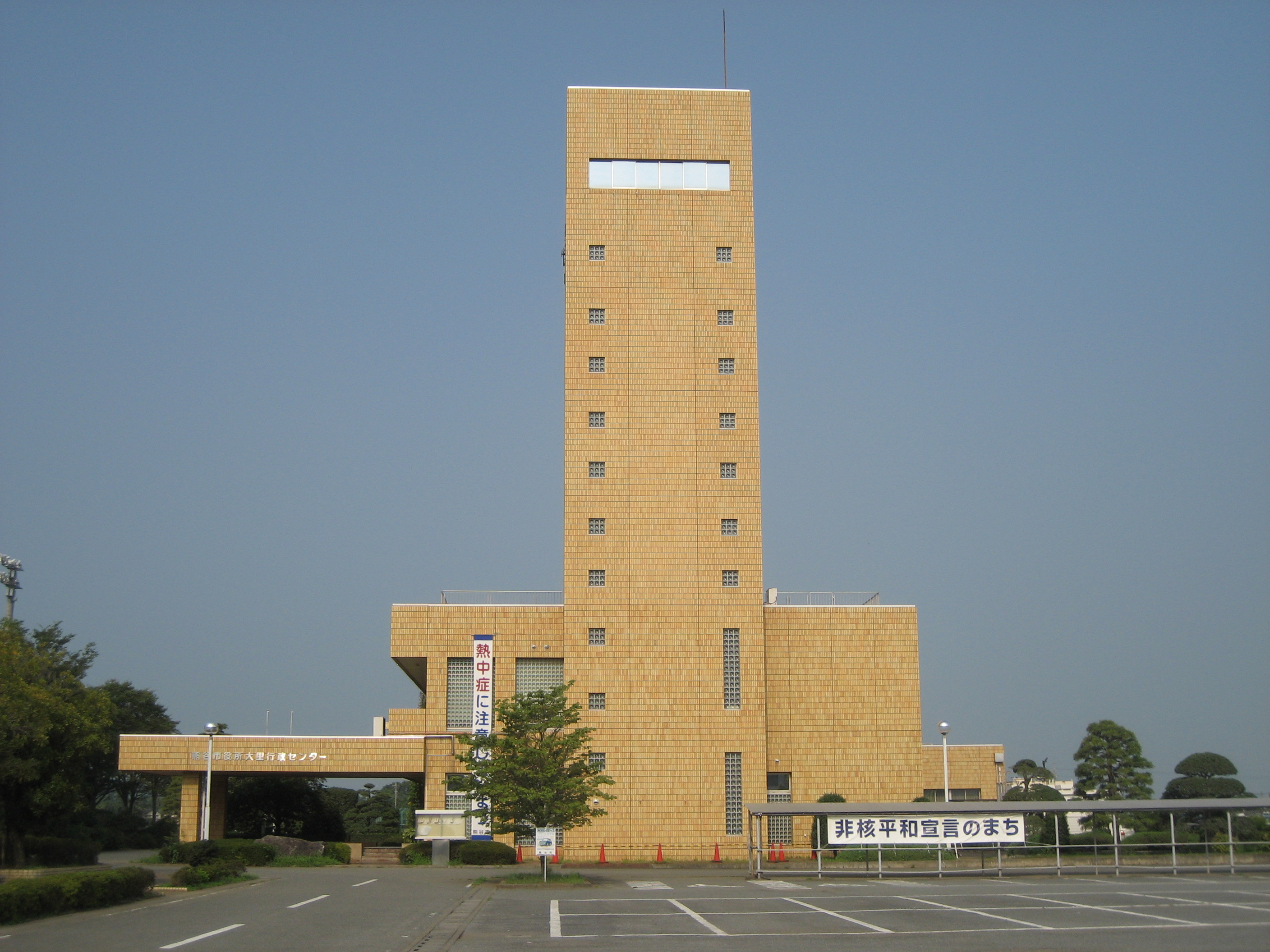 熊谷市役所大里行政センター庁舎（旧大里町役場）